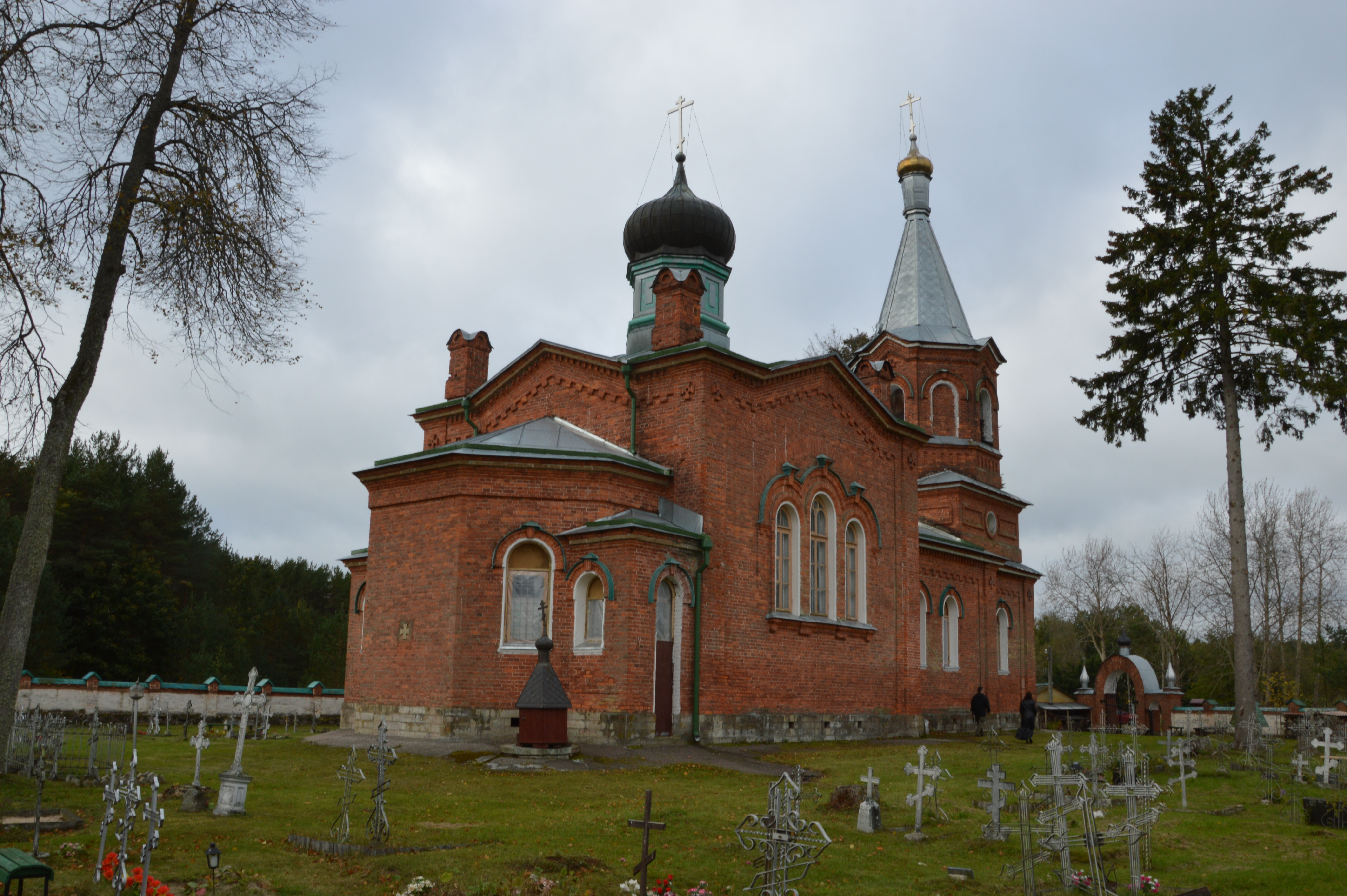 Alajõe Jumalaema Sündimise kirik